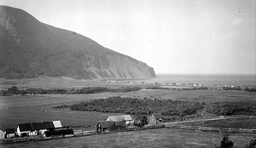 Ferme de M. Achille Mercier dans la vallée de Mont-Saint-Pierre, comté de Gaspé